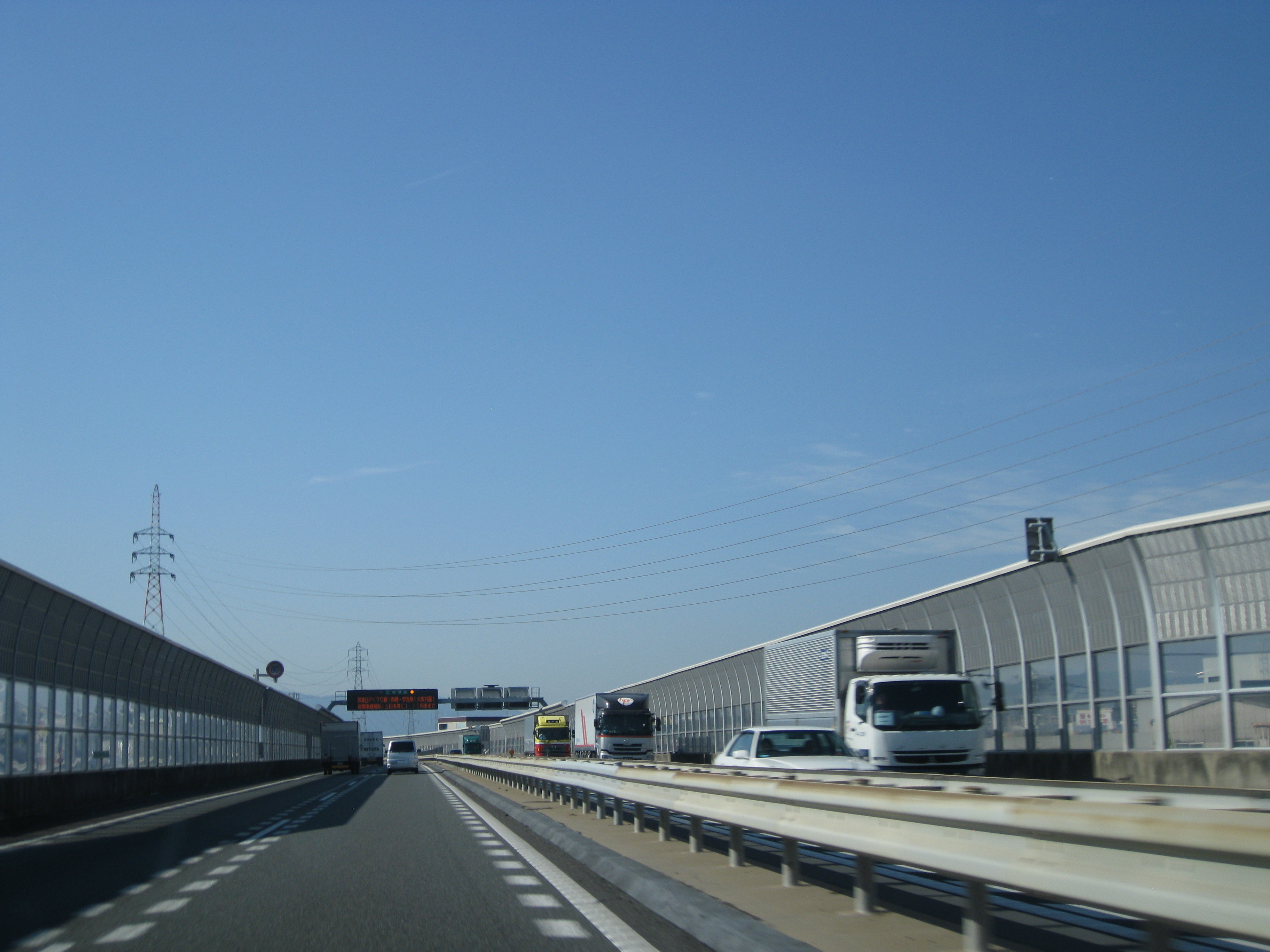 京滋バイパス下り 宇治西IC付近